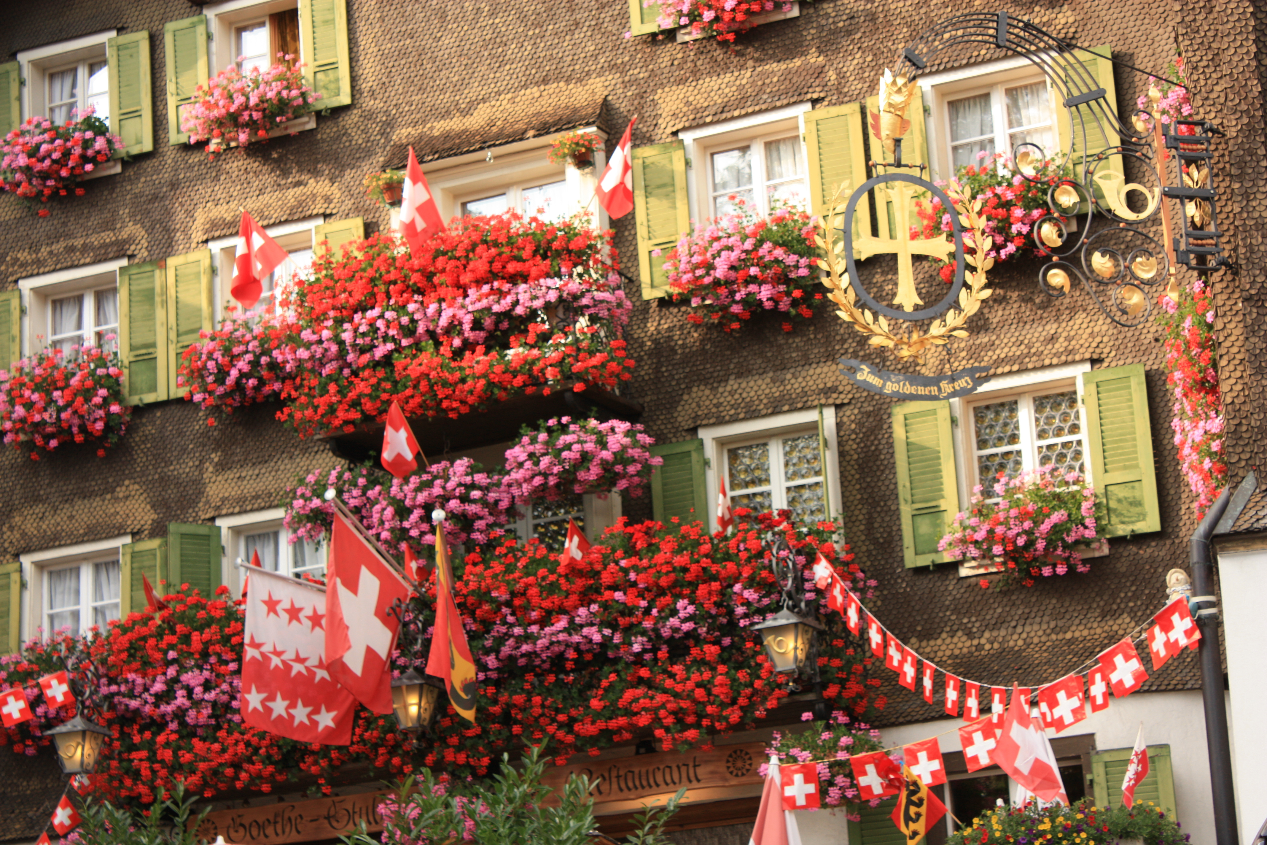 Balcon fleuri d'un hôtel à Münster dans le canton du Valais en Suisse.